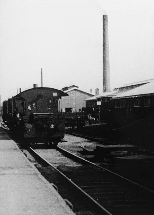 Train station in the Westerbork camp. Westerbork, the Netherlands, between 1942 and 1944. US Holocaust Memorial Museum, courtesy of Trudi Gidan. — US Holocaust Memorial Museum